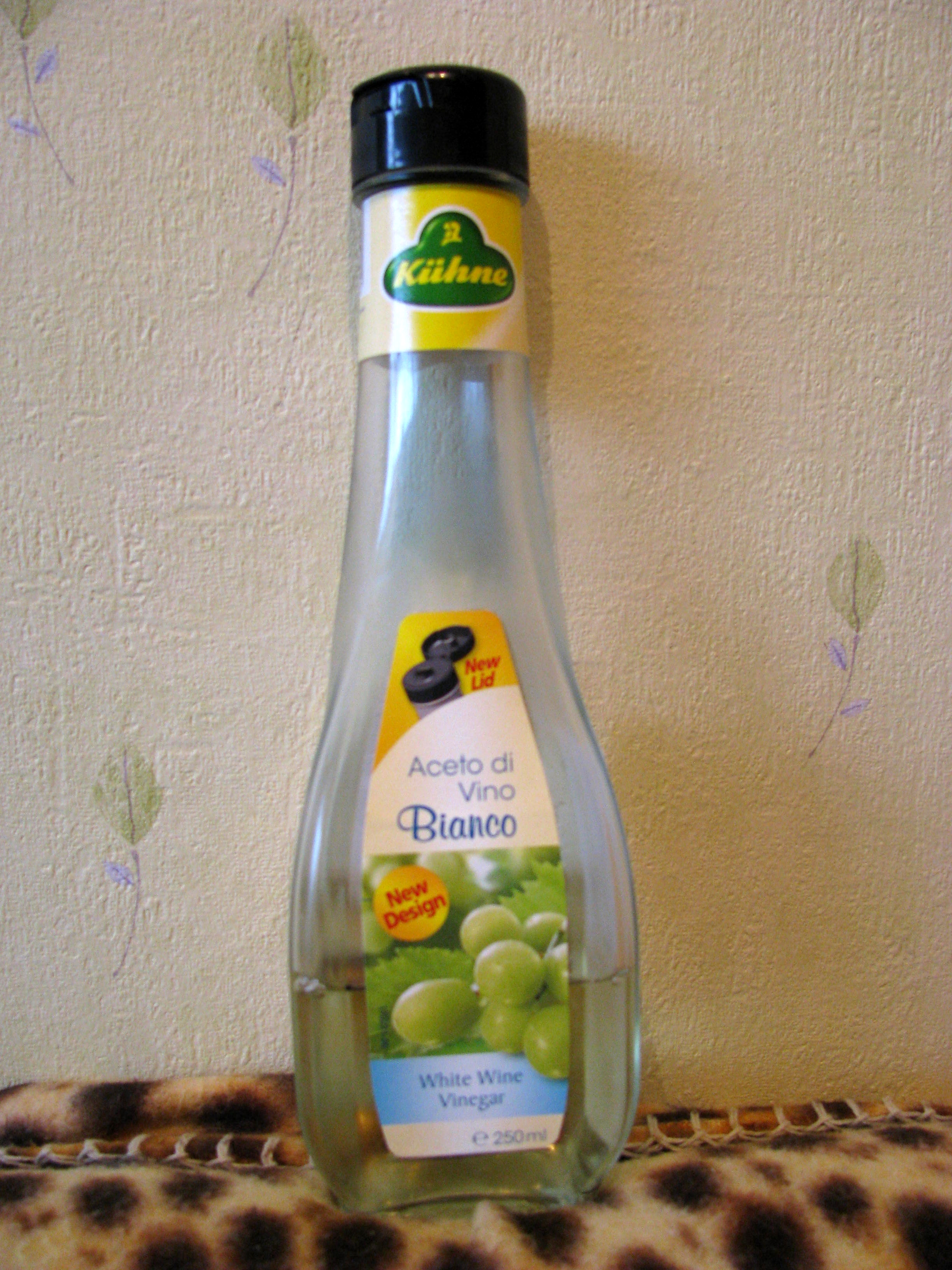 Valge veiniäädikas